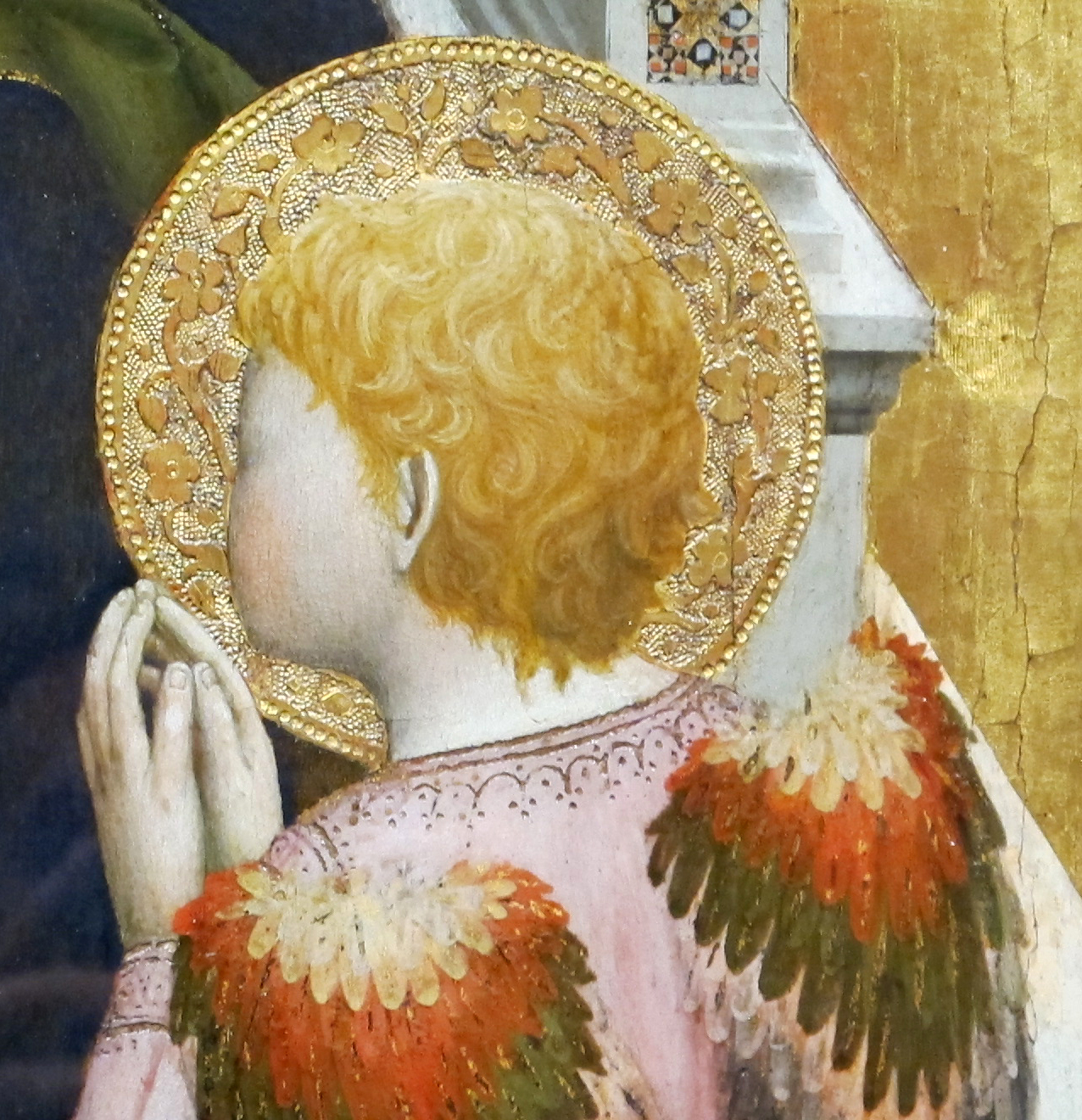 Trittico di San Giovenale, Masaccio